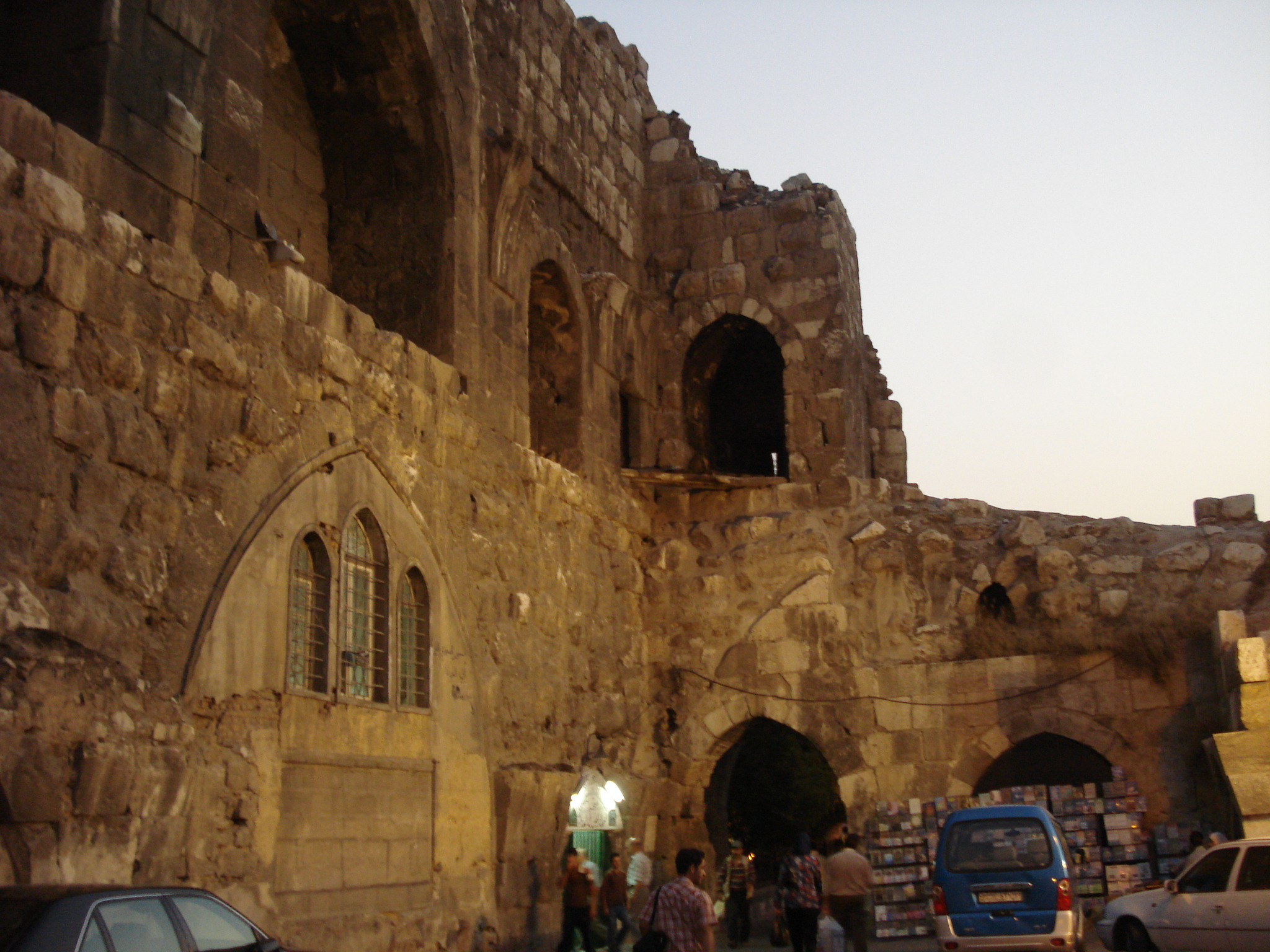 أحد جوانب قلعة دمشق في دمشق القديمة ويبدو مسجد صغير في داخل بناء القلعة